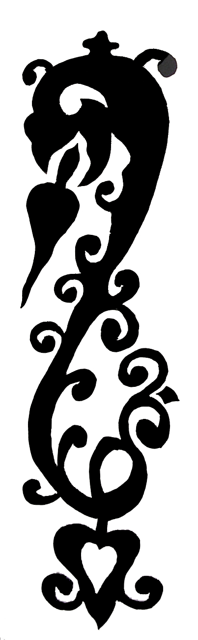 Der Artländer Drache, Flachschnitzerei der Renaissance, die sich im Kirchengestühl der St. Sylvester-Kirche und auf zahlreichen Bauernmöbeln ab dem 15. Jhd findet. Die vorliegende Zeichnung entstand durch Abpausen der Figur von einer in Privateigentum stehenden Artländer Aussteuertruhe